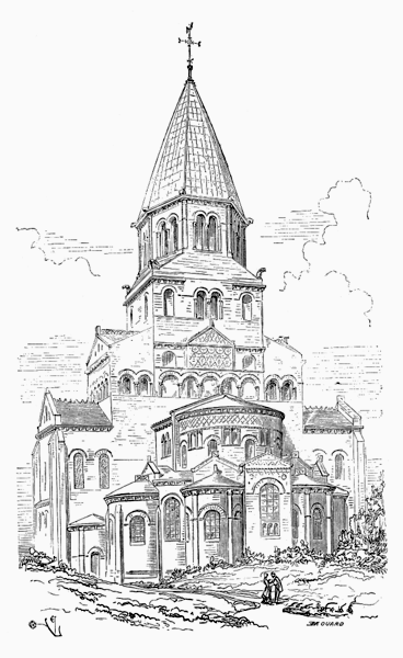 St-Austremoine d'Issoire, Druckgrafik, Chorhaupt